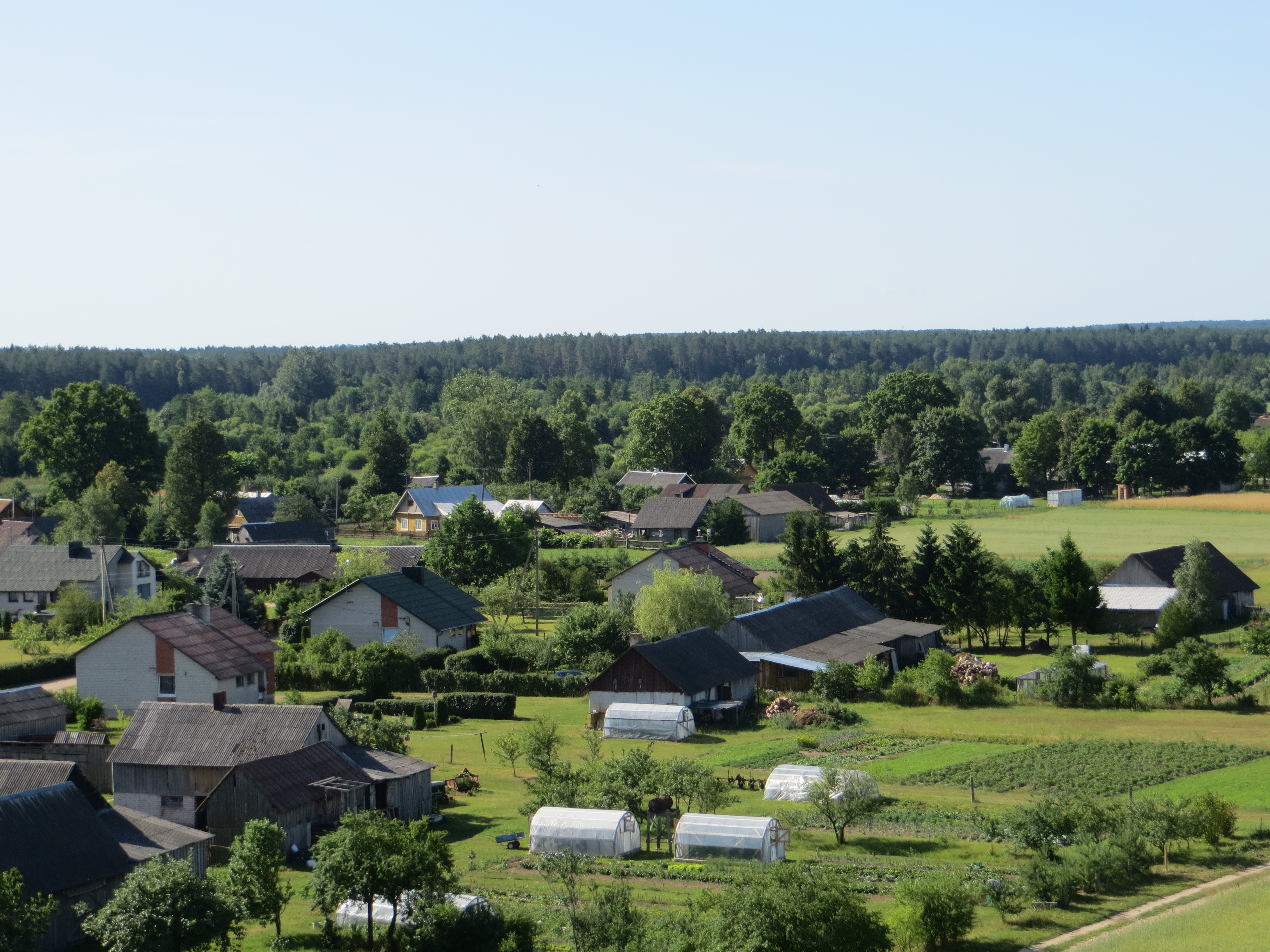 Dargužiai 65445, Lithuania